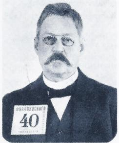 Polòn kuvattuna Siperian karkoituspassia varten vuonna 1916.